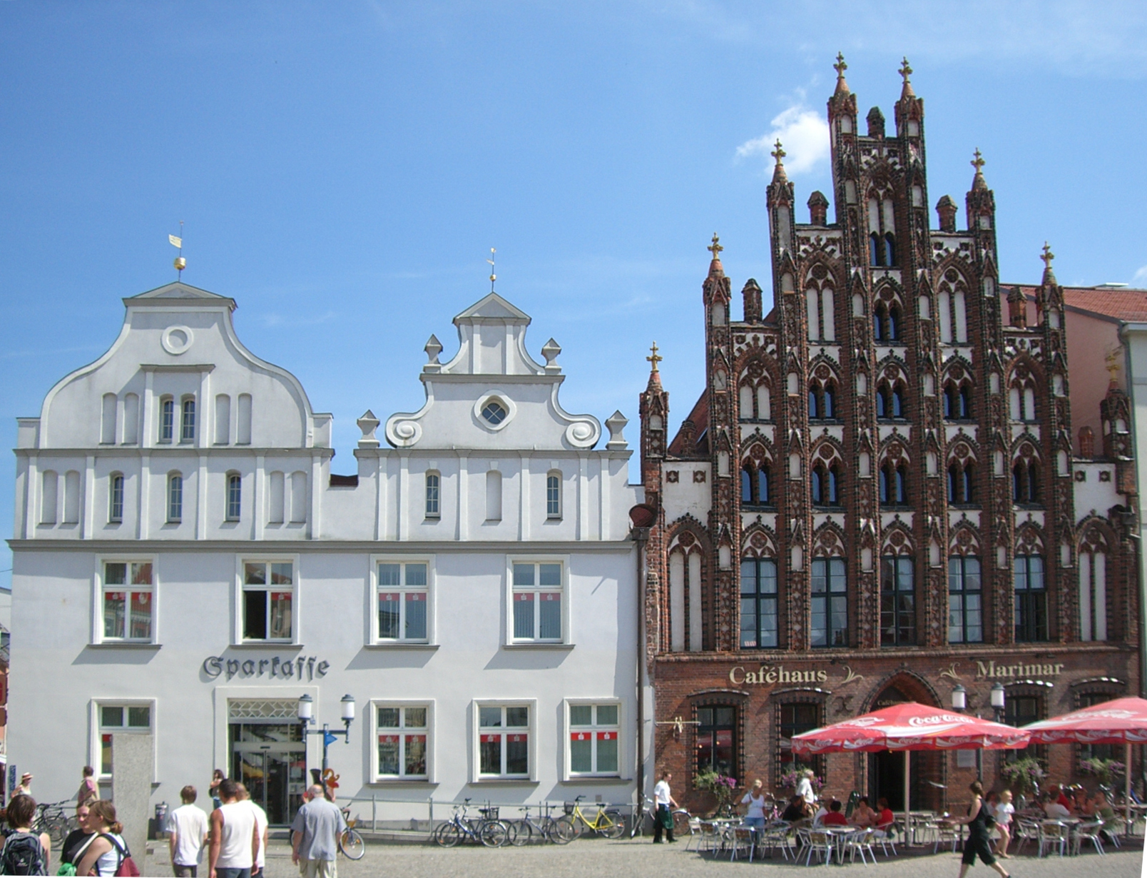 Greifswald, Markt 10 (Sparkasse) und Markt 11 (Wohnspeicherhaus)